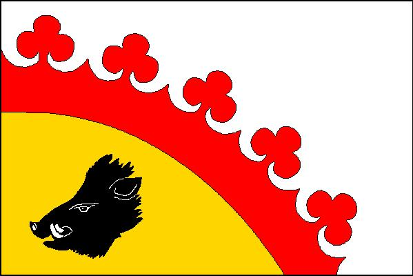 Vlajka obce Bolešiny